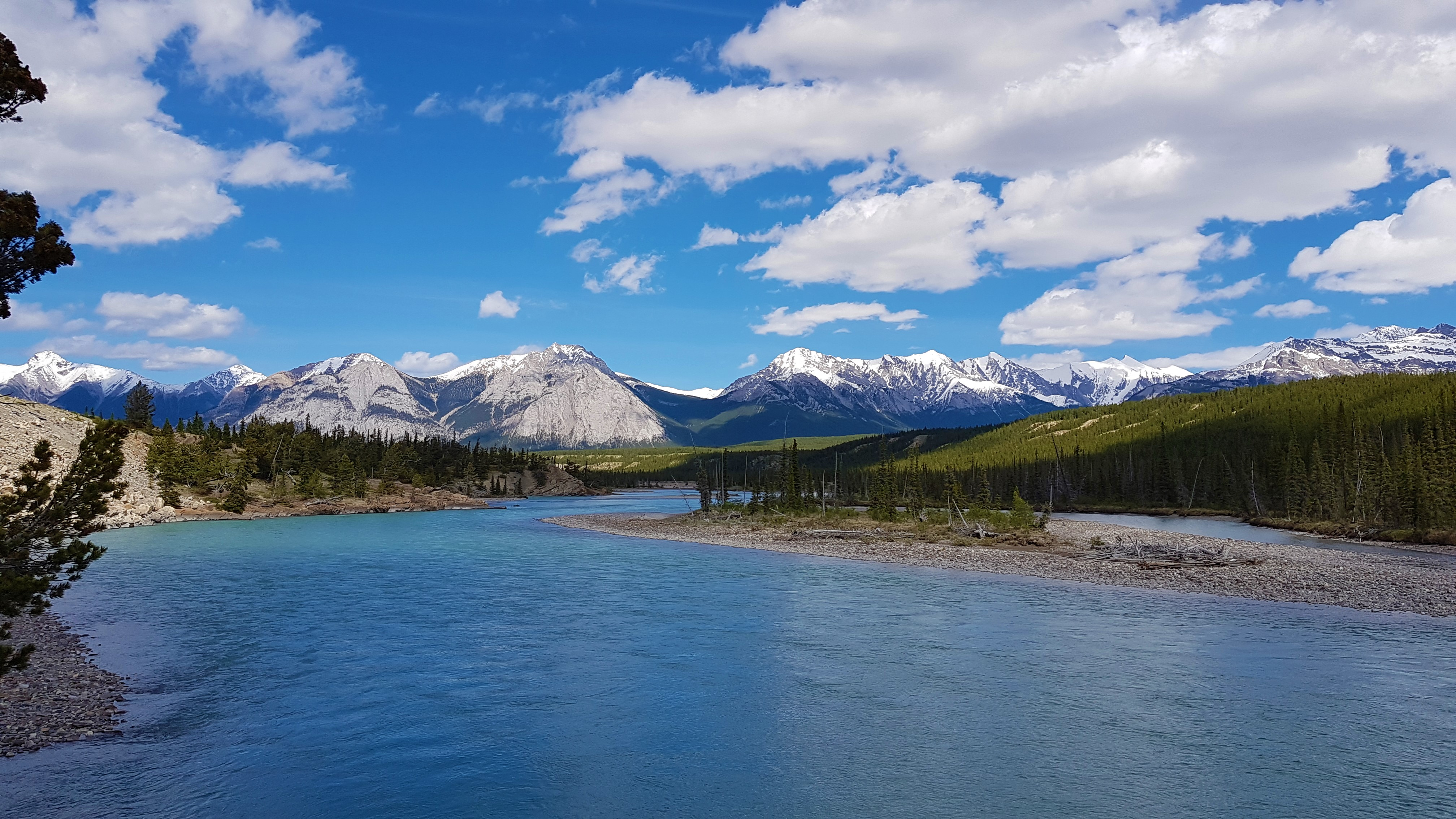 Річка Північний Саскачеван неподалік від Абрахам Лейк North Saskatchewan River near Abraham Lake